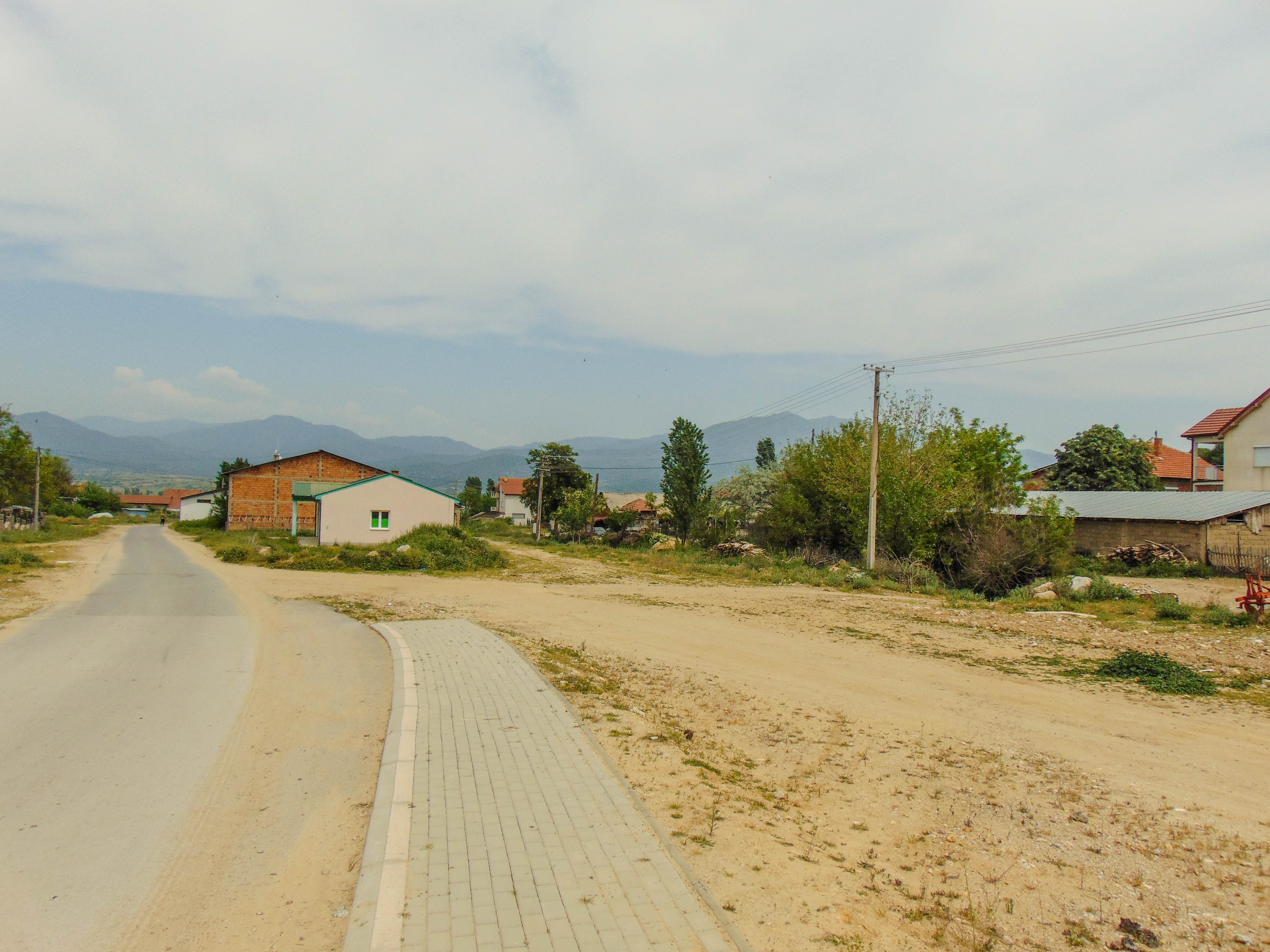 Калуѓерица - Општина Радовиш